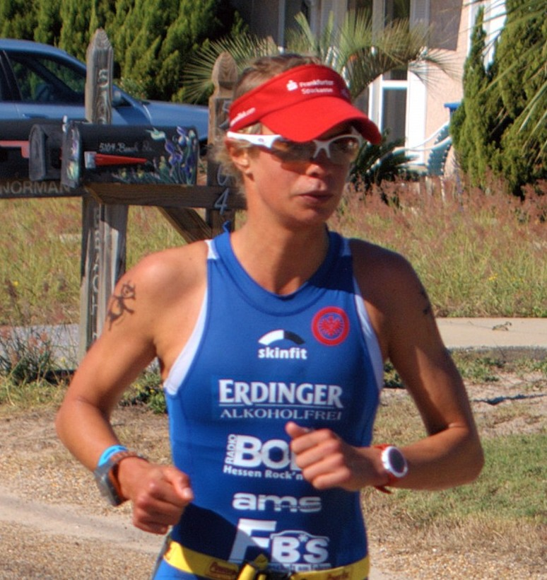 Meike Krebs at Ironman Florida 2010